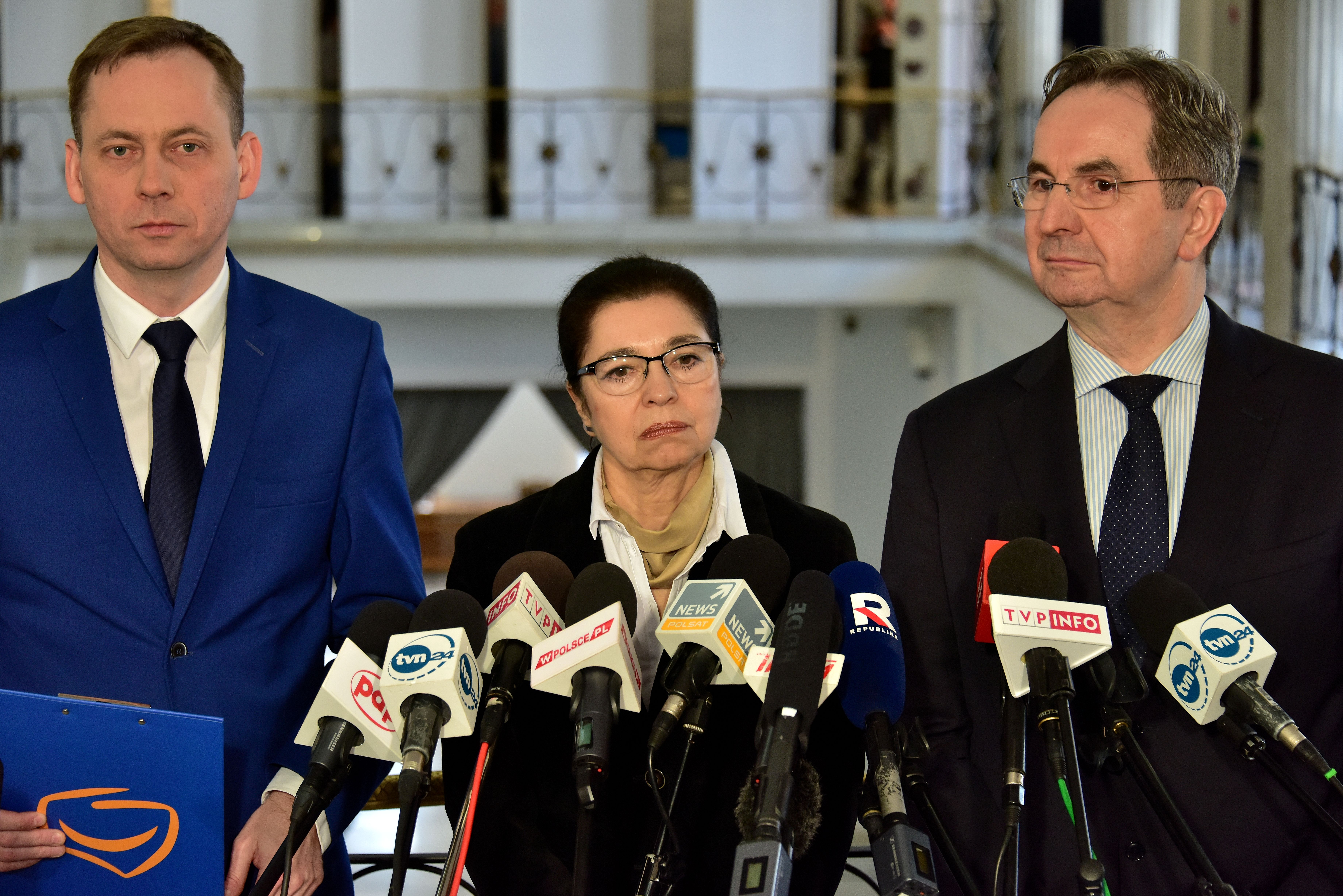 Posłowie Zbigniew Konwiński, Małgorzata Chmiel i Stanisław Lamczyk podczas konferencji prasowej w Sejmie